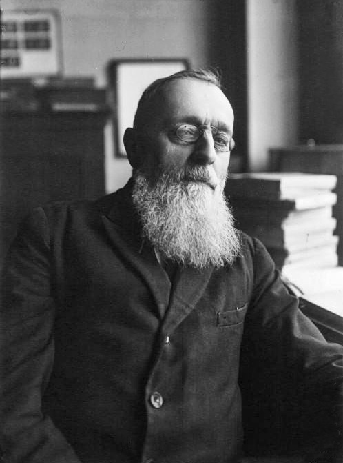 M. le Professeur Lacroix, membre de l'Institut : museum de Minéralogie du Jardin des Plantes : photographie de presse